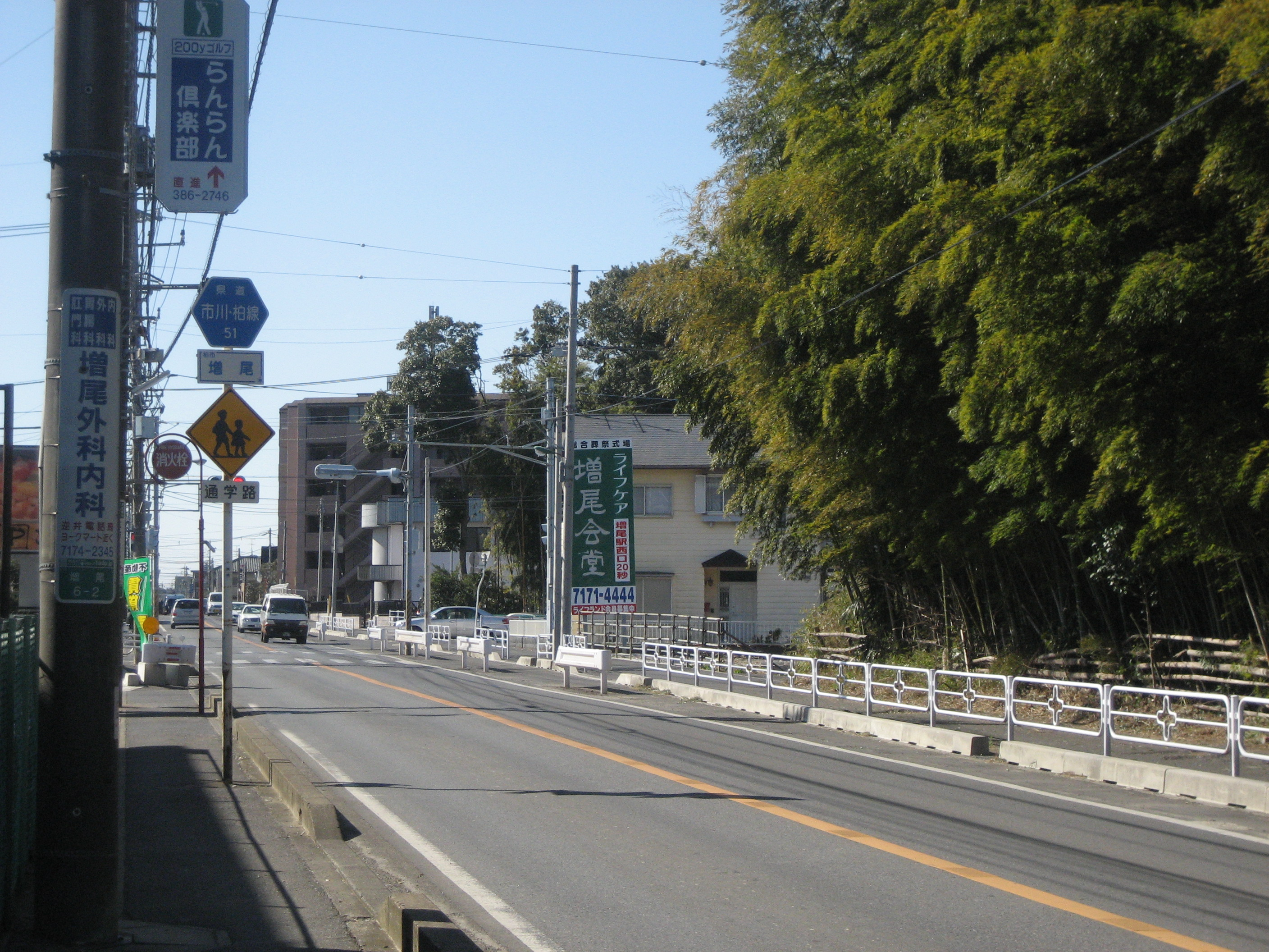 千葉県道51号線柏市内